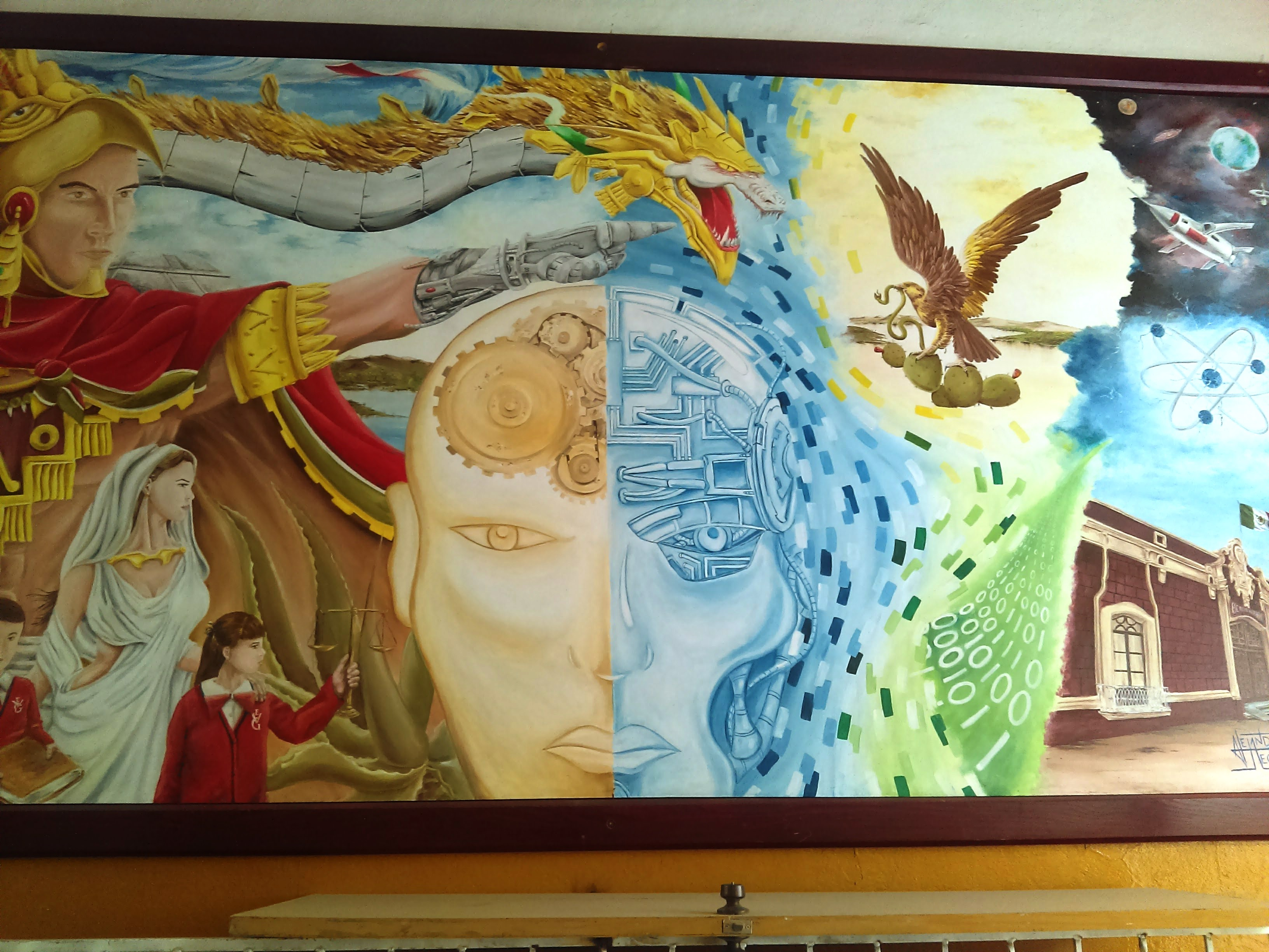 Mural en la Casa Colorada en Pachuca, México.